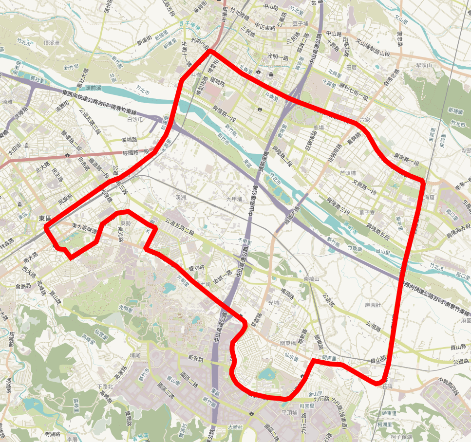 大新竹輕軌計畫的初步路廊規劃